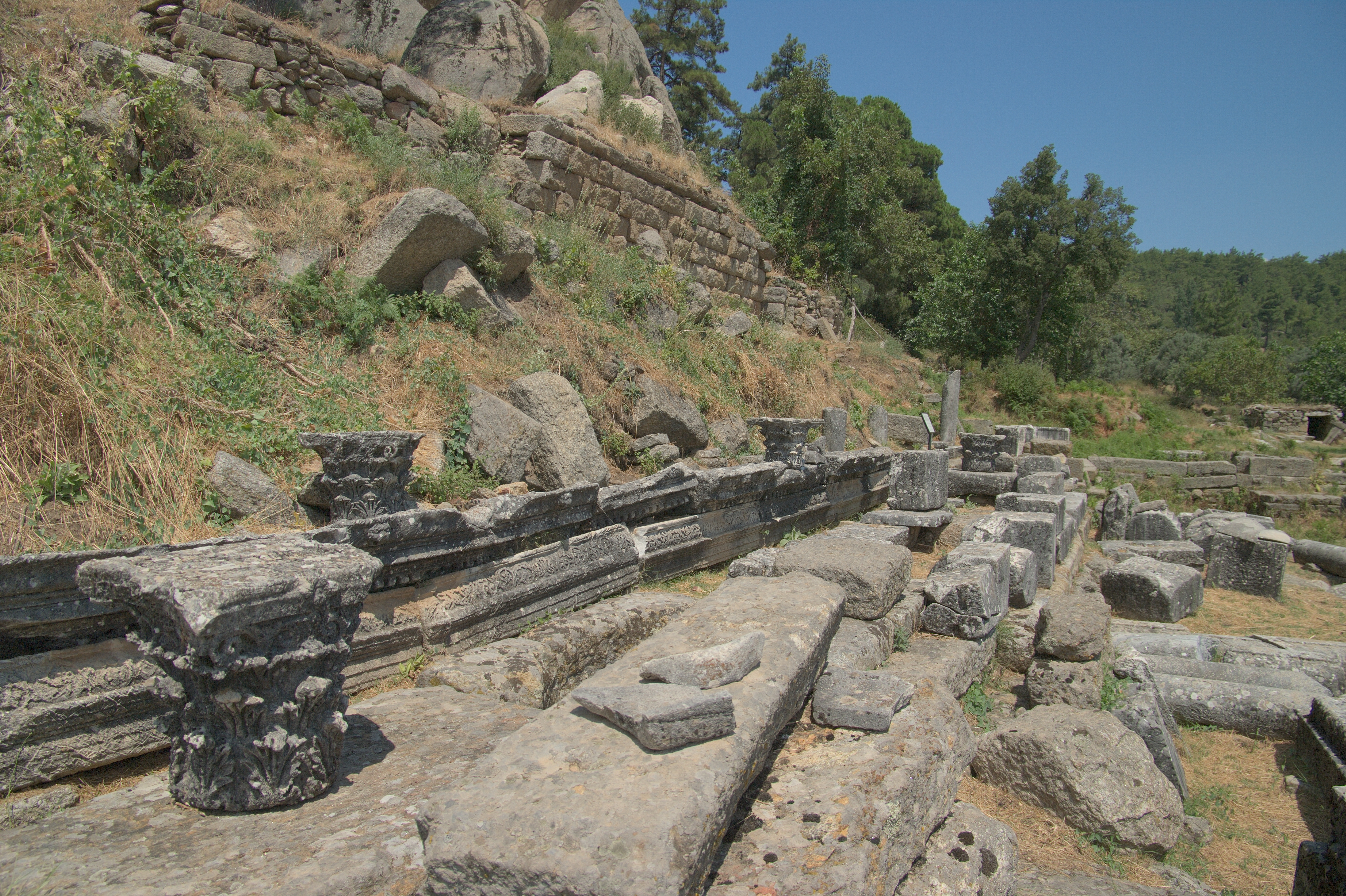 Лабранда. Северный портик